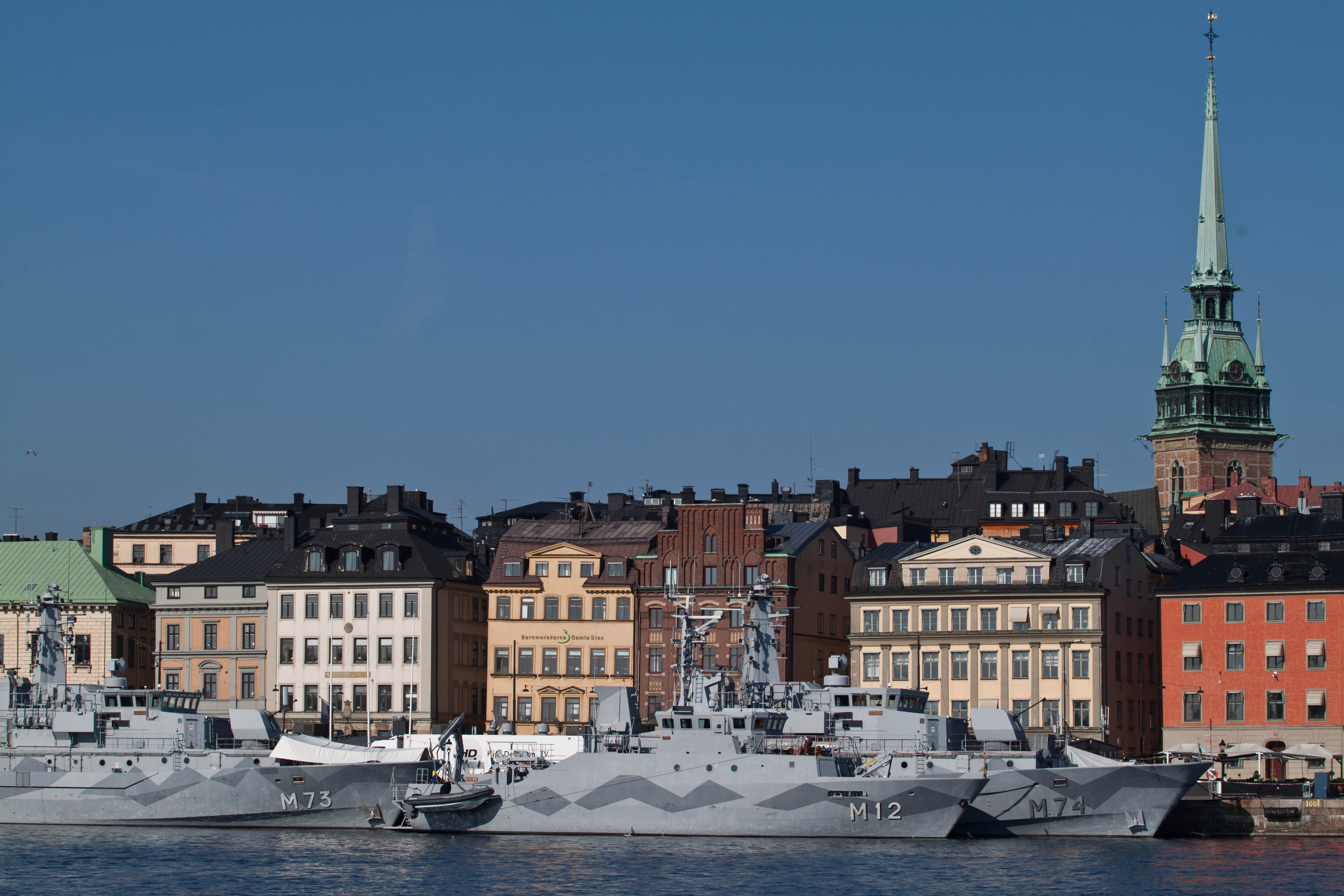 Minröjarna HMS Koster (M73) och HMS Kullen (M74), båda av Koster-klass, vid Skeppsbron i Stockholm. I förgrunden HMS Spårö (M12), en minröjare av Spårö-klass (tidigare Styrsö-klass).